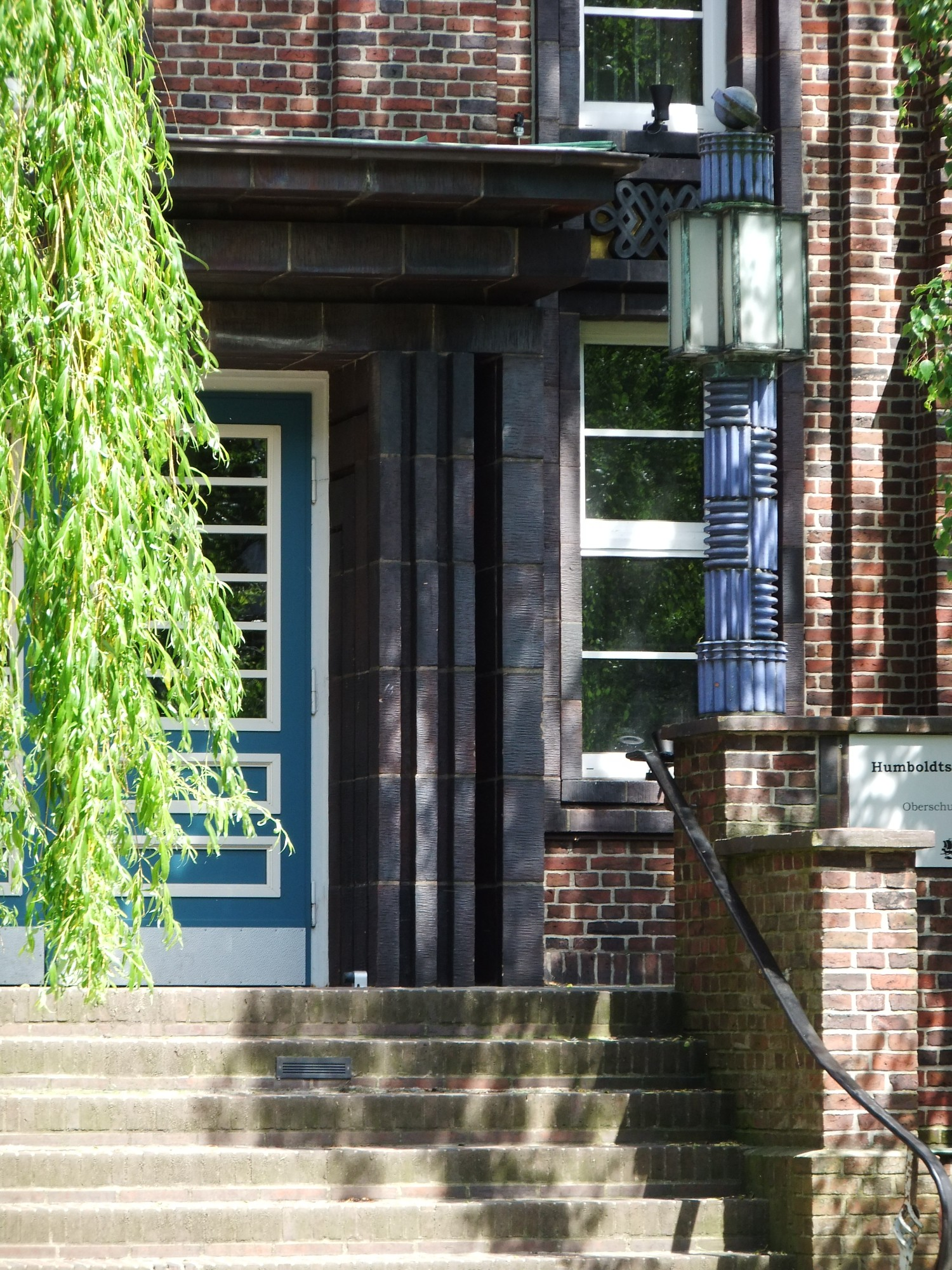 Humboldtschule in Bremerhaven, Schillerstraße 87. Das abgebildete Objekt ist ein geschütztes Kulturdenkmal in der Freien Hansestadt Bremen, mit der Nr. 1643 beim Landesamt für Denkmalpflege registriert.